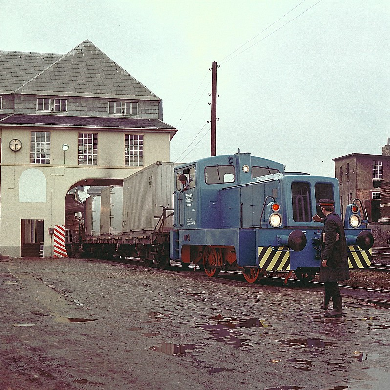 V 10 B (gebaut 1962 unter der Fabriknummer 252344 bei LKM) im Glaswerk Großbreitenbach, Lok 1986 an Glaswerk Finsterwalde verkauft, 1995 verschrottet